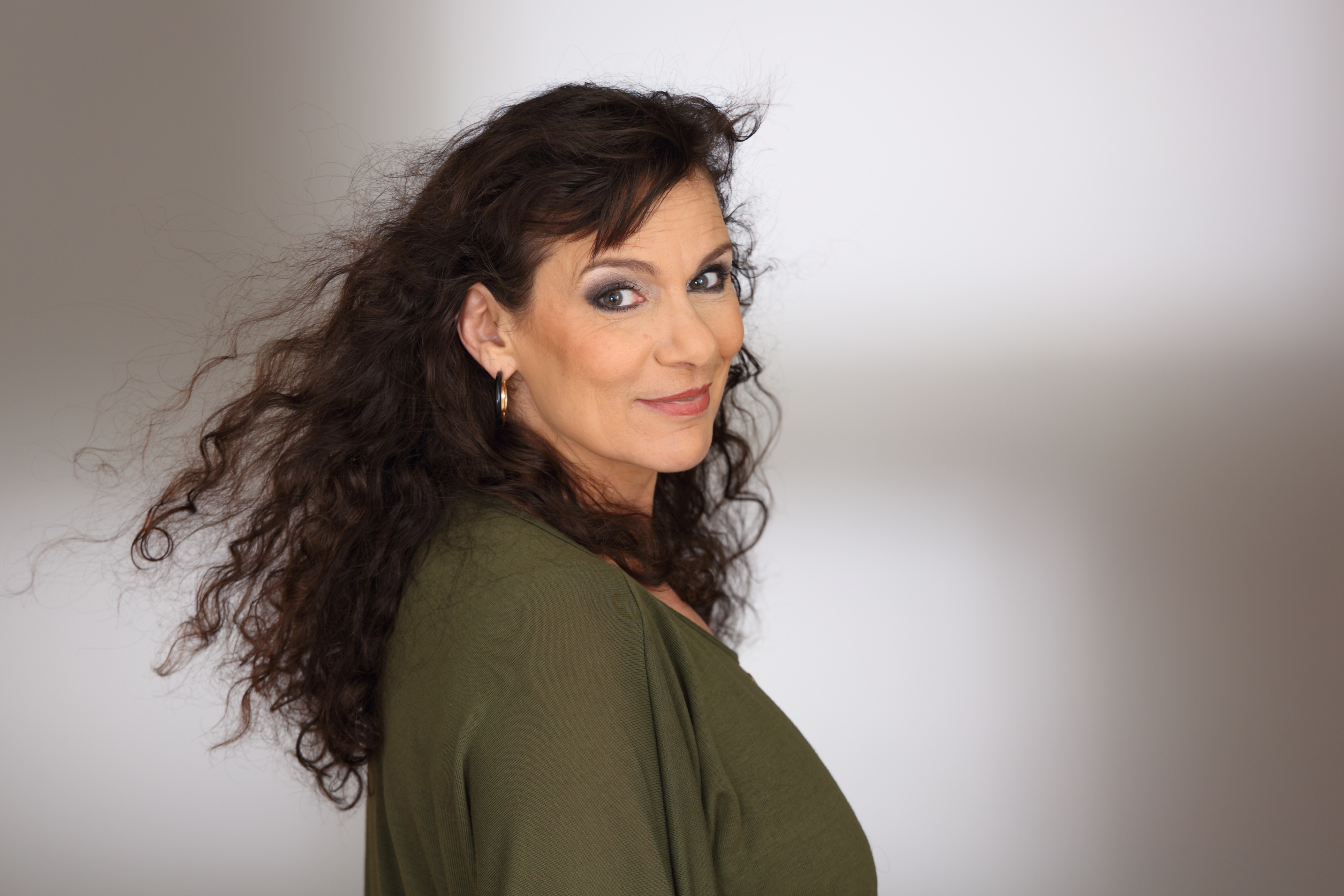 Katharina Maehrlein – Autorin und Herausgeberin, Business Coach und Vortragsrednerin.